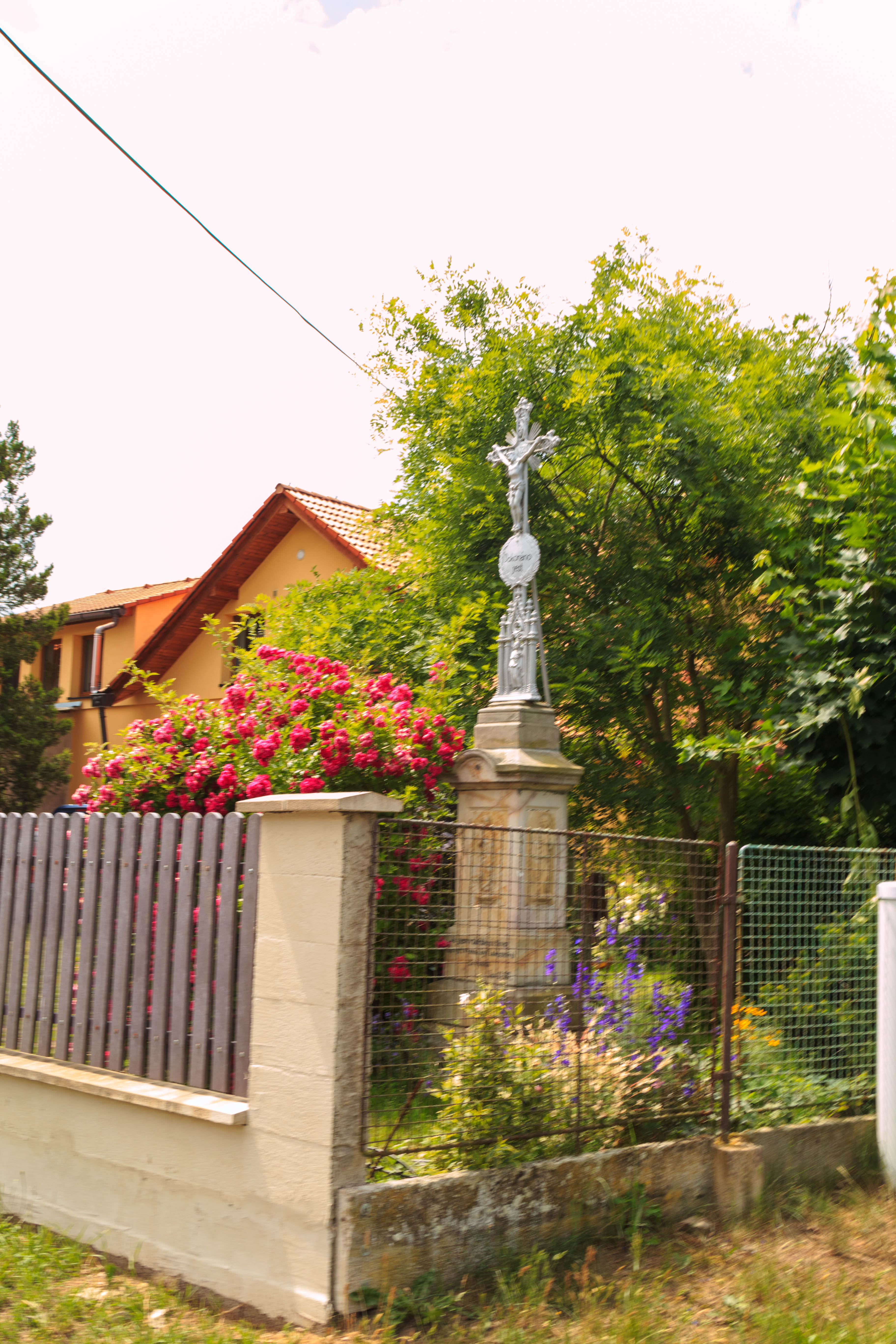 Korunka u Čermné nad Orlicí kříž